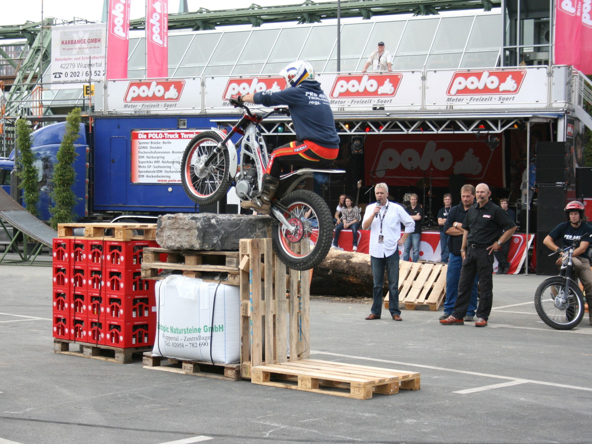 NRW-Tag an der Ohligsmühle in Wuppertal